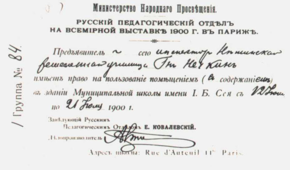 Документ, підписаний завідувачем Російського педагогічного відділу Є.Ковалевським: «Міністерство Народної Освіти. Російський педагогічний відділ на всесвітній виставці. Пред’явник пропуску на виставку інспектор Ніжинського ремісничого училища В.І.Нечкін має право на користування приміщенням, яке знаходиться в будівлі муніципальної школи імені І.Б.Сея з 12 до 21 червня 1900 року в місті Парижі».